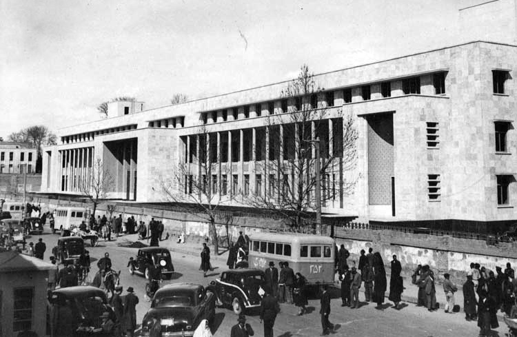 ساختمان بانک ملی ایران شعبه سبزه میدان در میانه‌های دوران پهلوی